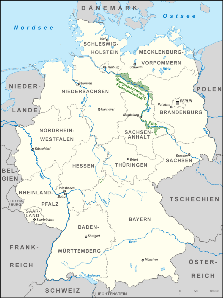 Karte des Biosphärenreservates Flusslandschaft Elbe in Deutschland